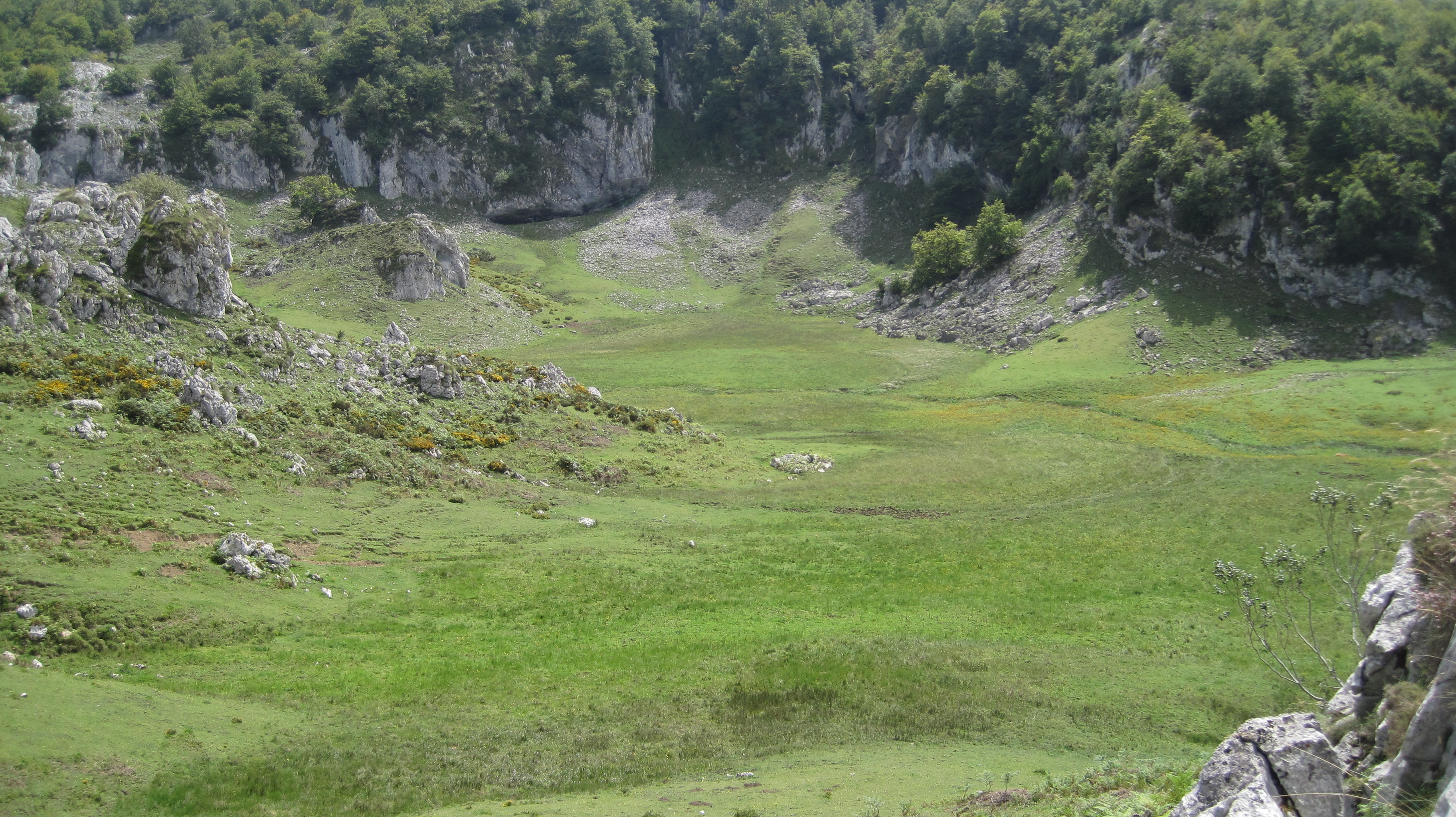 Vista veraniega del lago Bricial, en Covadonga (Asturias, España).